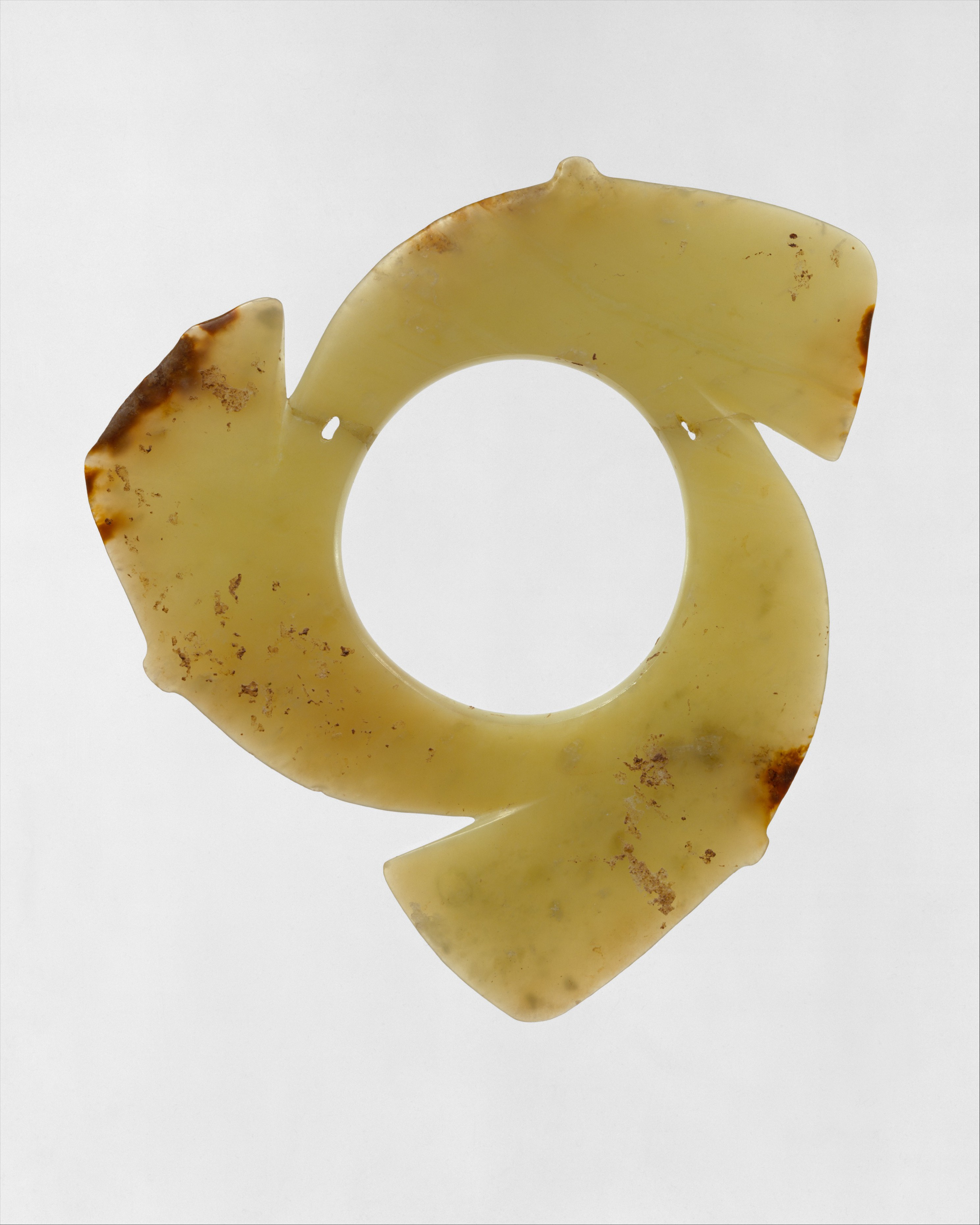 China; Disk; Jade